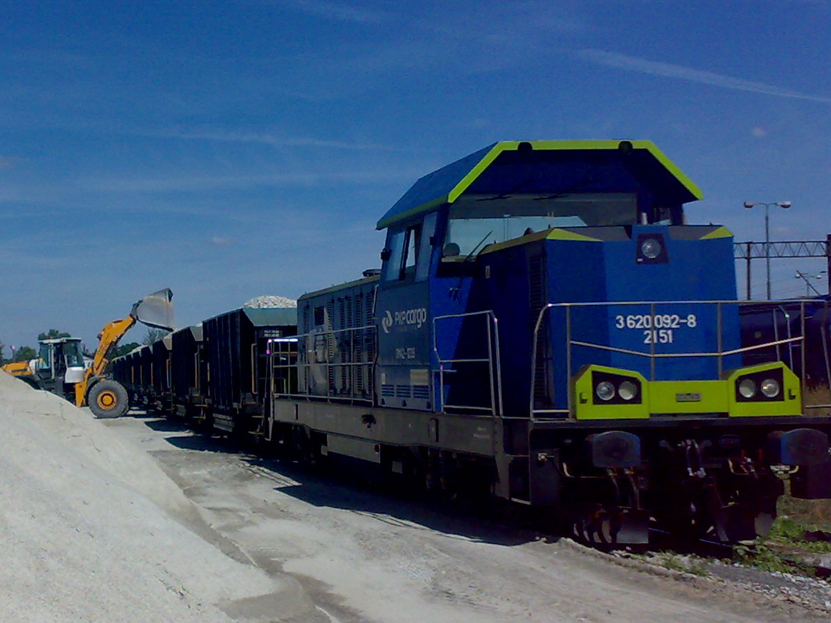 Ładowanie pociągu towarowego.